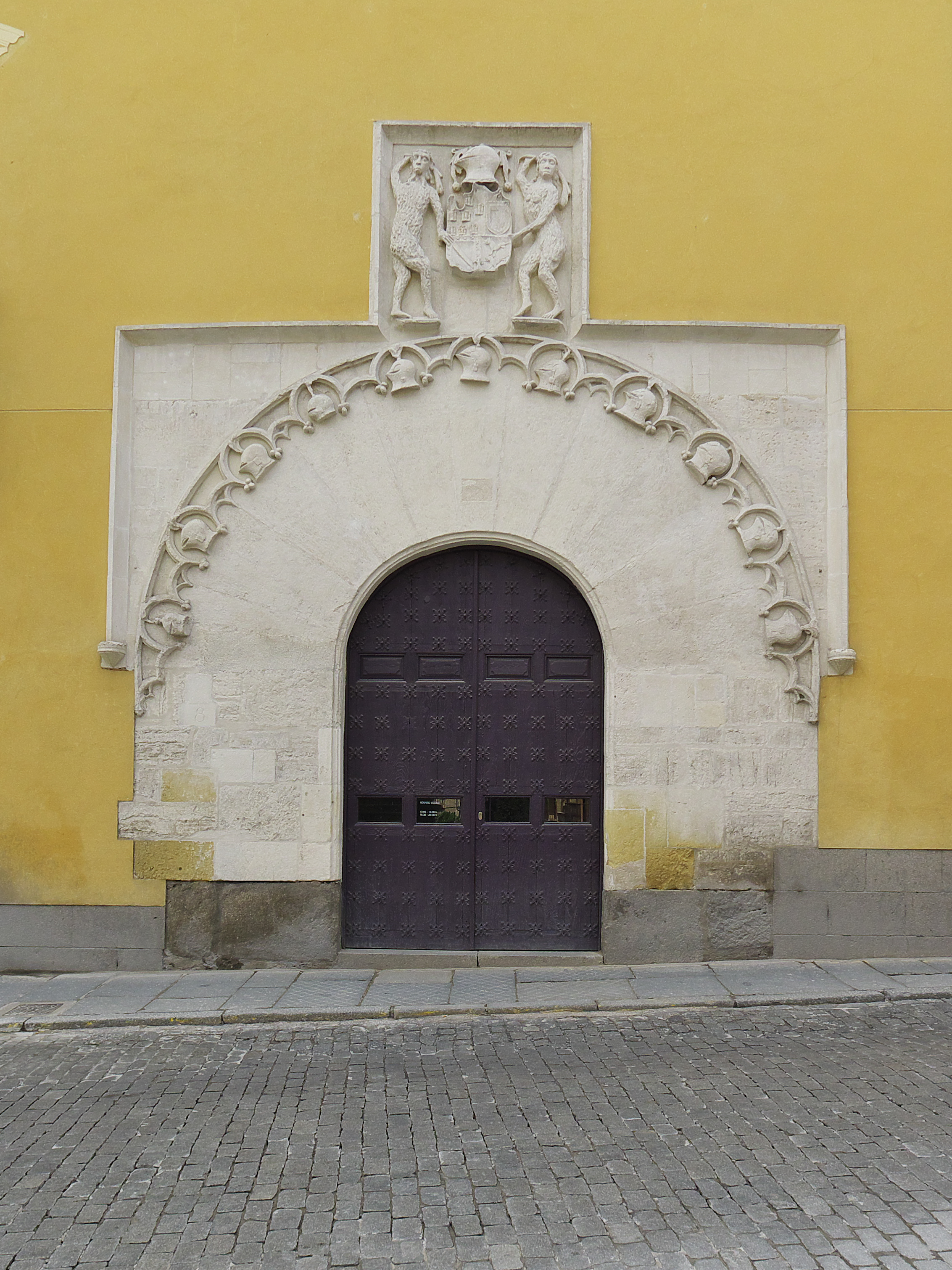 Original portada del palacio (s. XVI)